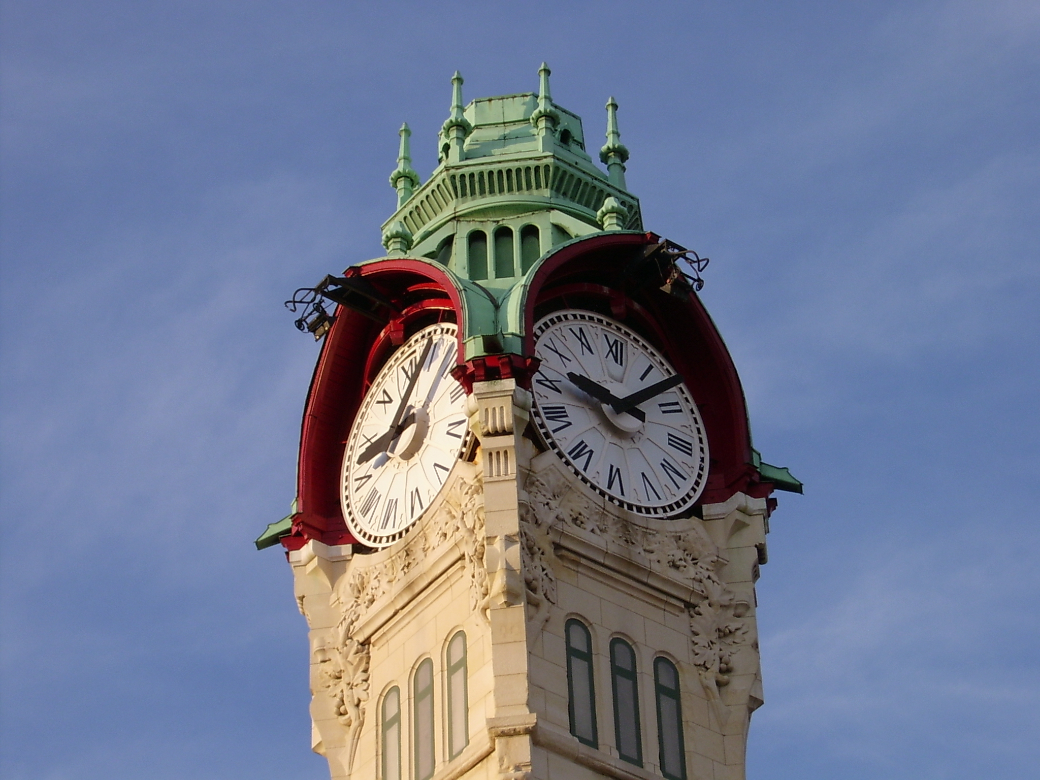 Rouen (Seine-Maritime, France) L'horloge du beffroi de la gare. .